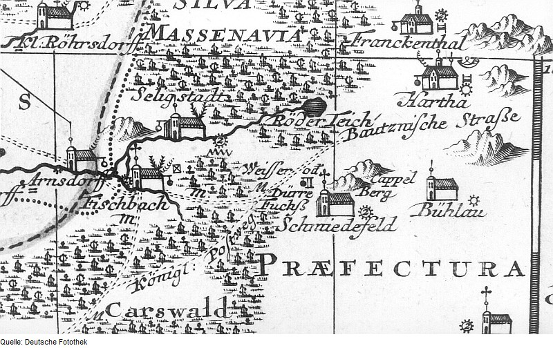 Original image description from the Deutsche Fotothek Großharthau. Seutter, Kirchenkreis Dresden, Mitte 18. Jh. (Sign.: VII 43)